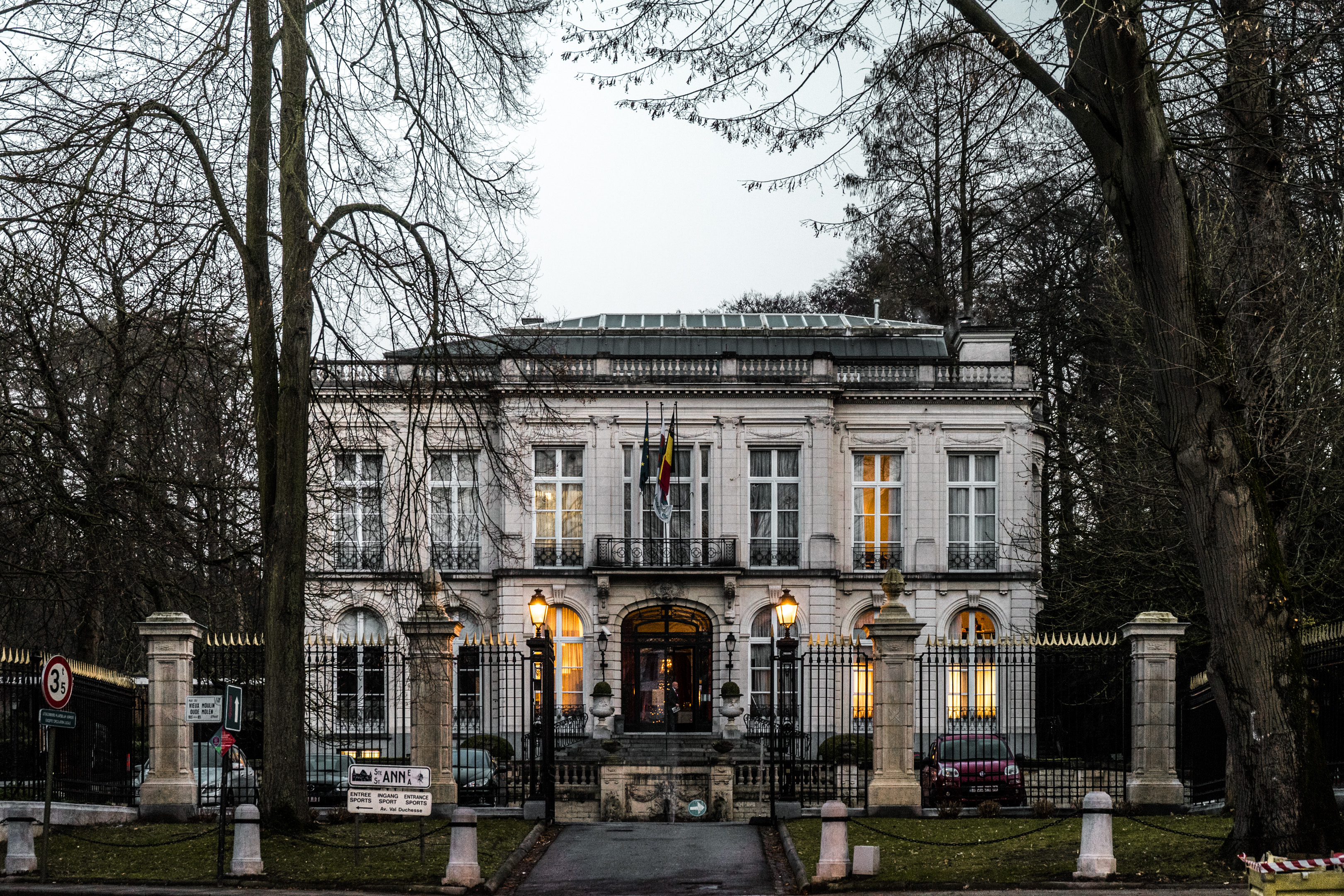 Façade d'entrée du Château Sainte-Anne